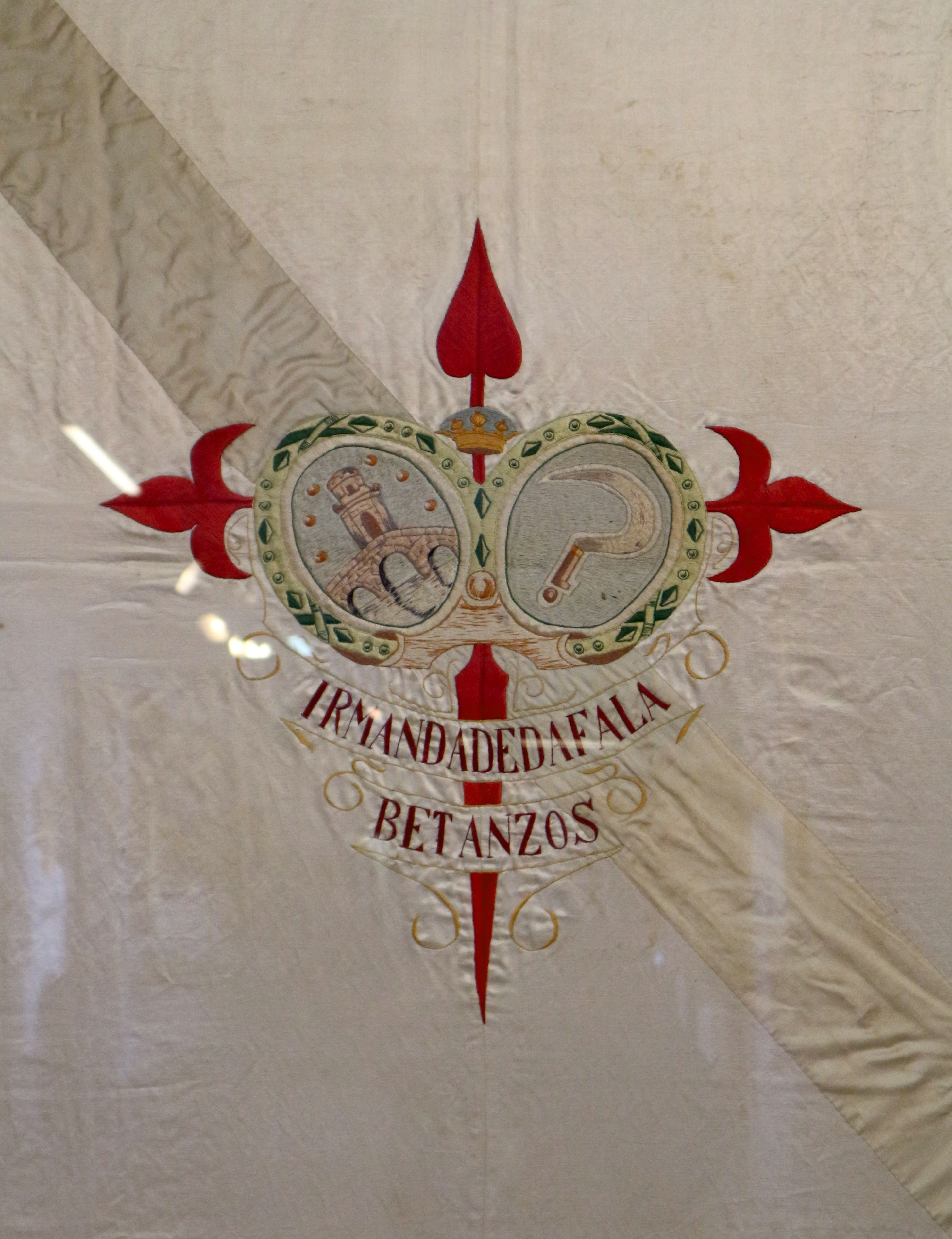 Bandeira da Irmandade da Fala de Betanzos exposta no Museo das Mariñas, Betanzos.